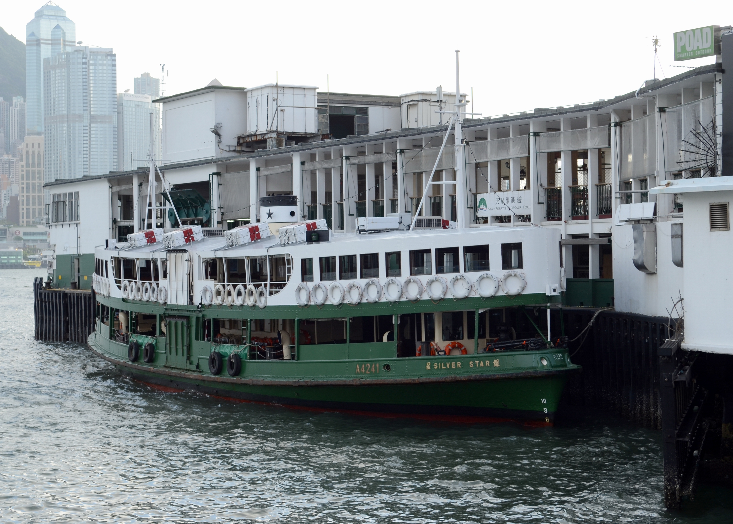 银星（Silver Star）